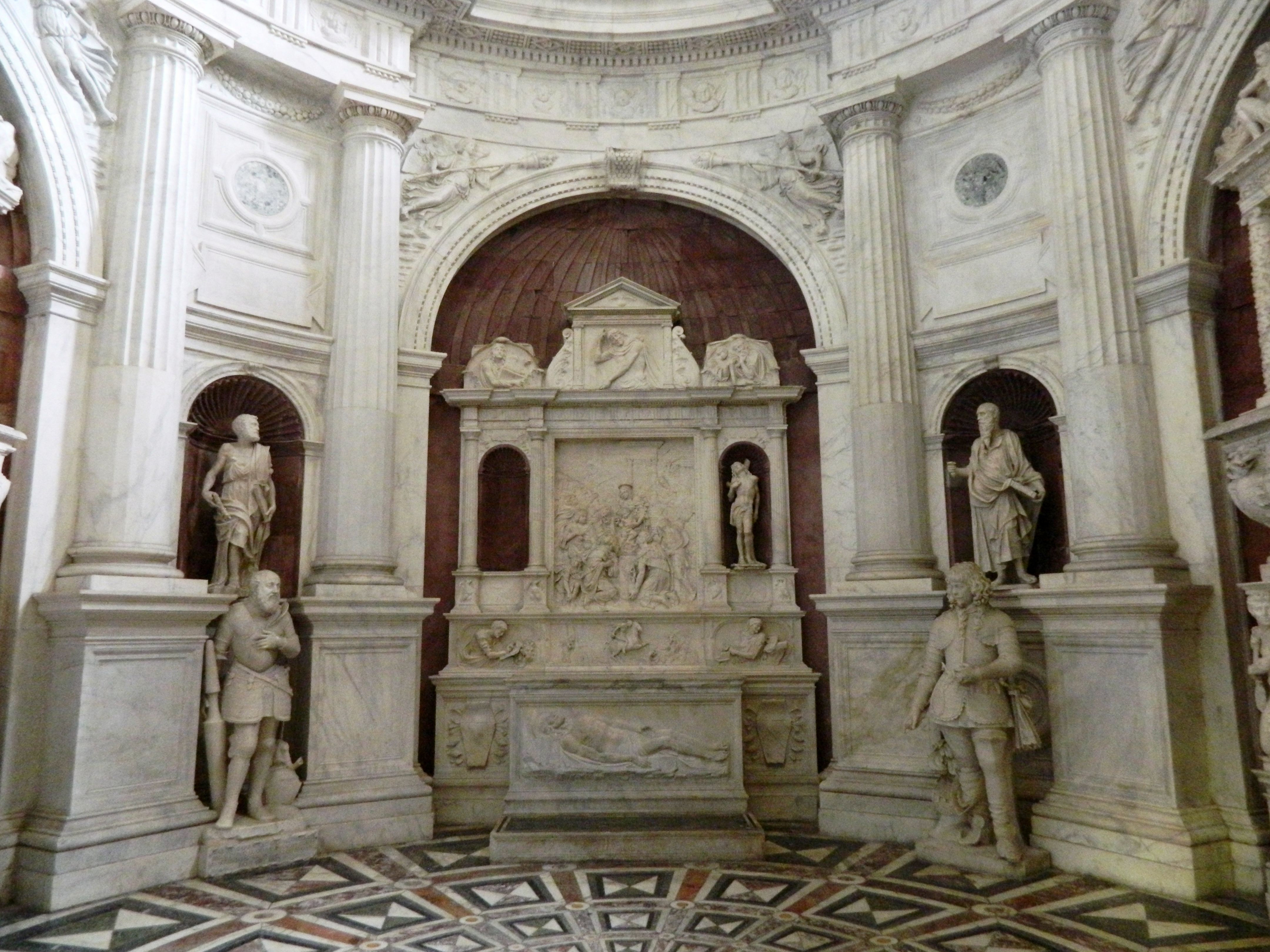 Cappella Caracciolo di Vico (Chiesa di San Giovanni a Carbonara di Napoli) - Al centro è l'altare del'Epifania di Diego De Siloe e Bartolomé Ordonez. A Sinistra la scultura di Marcello Caracciolo (Girolamo D'Auria 1573) e a destra di Carlo Maria Caracciolo (Ercole Ferrata 1641). Alle spalle due apostoli della scuola di Giovanni da Nola (metà XVI secolo)